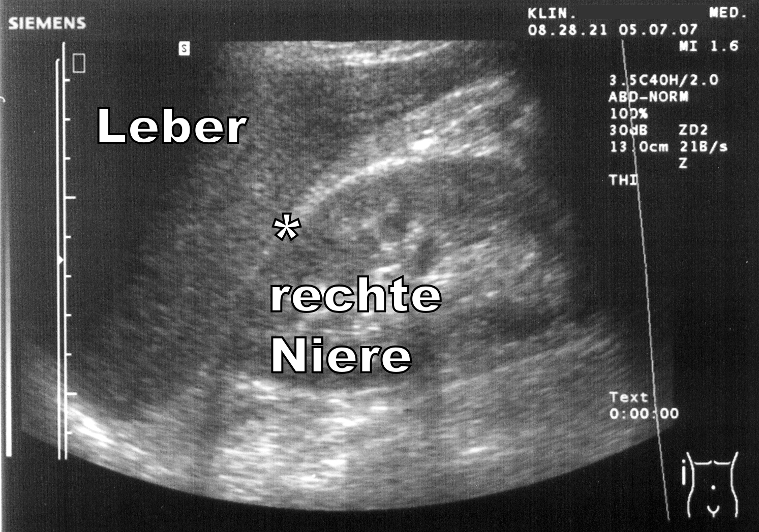 Ultraschallbild der Morison-Grube